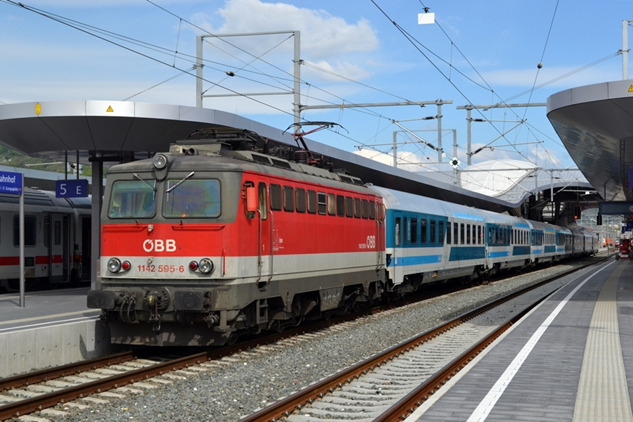 1142 595-6 als EC 151 am Grazer Hauptbahnhof, 21.04.2015